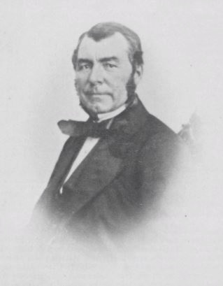 Stephen Henry Thomas